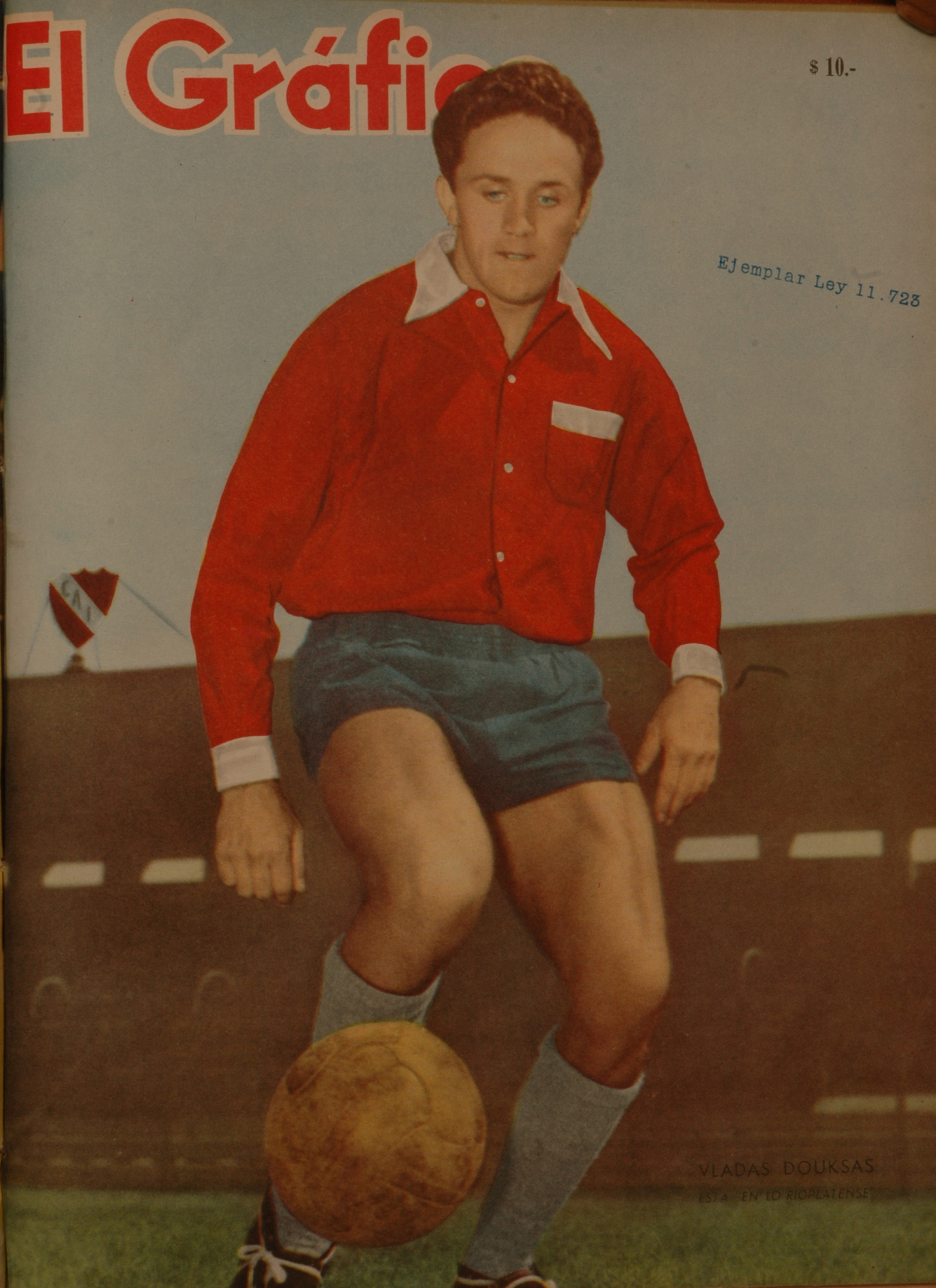 El Grafico del 18 de Mayo de 1960. Edicion 2121